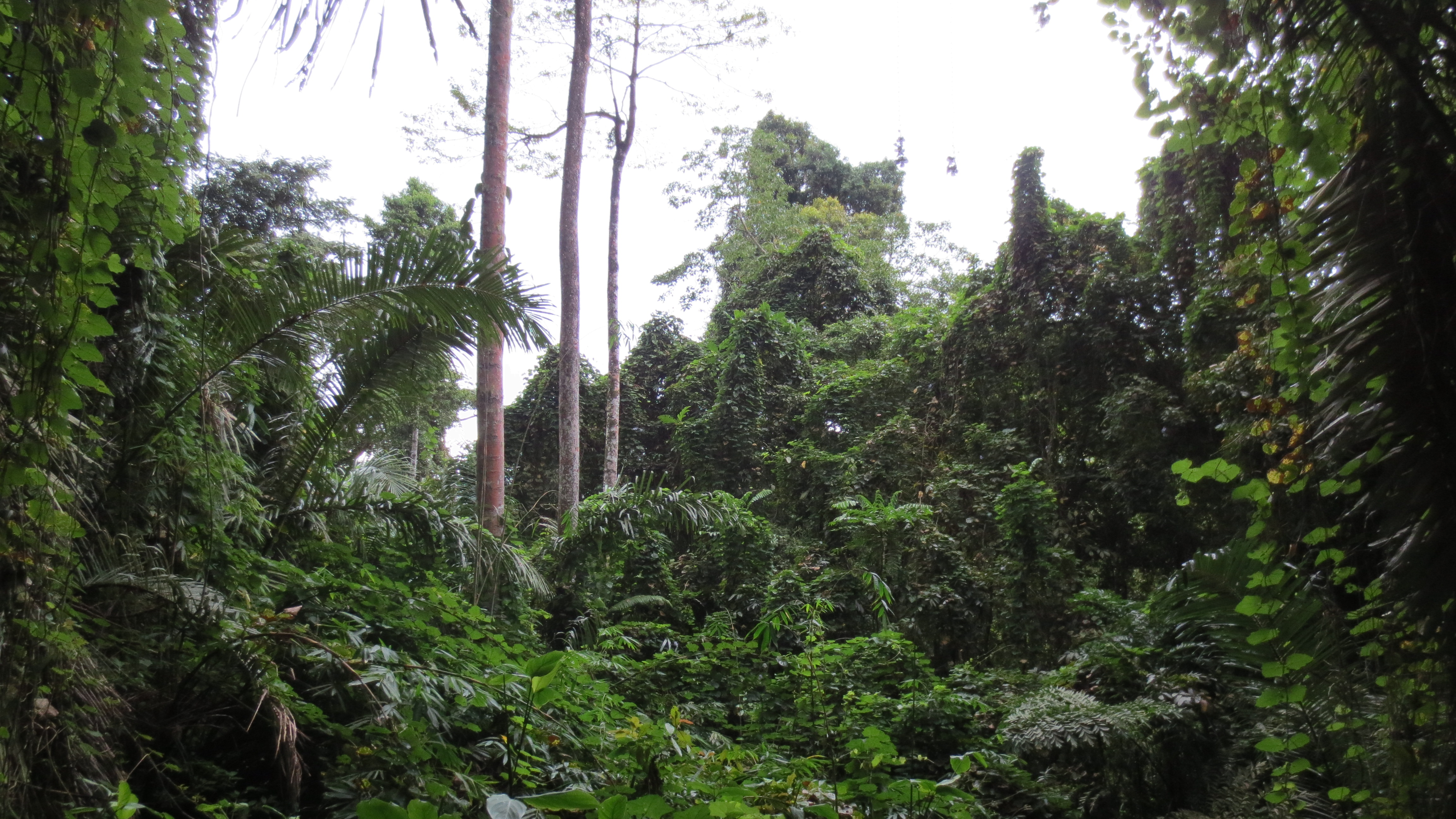 Opening In Jungle Canopy, Mt Makiling